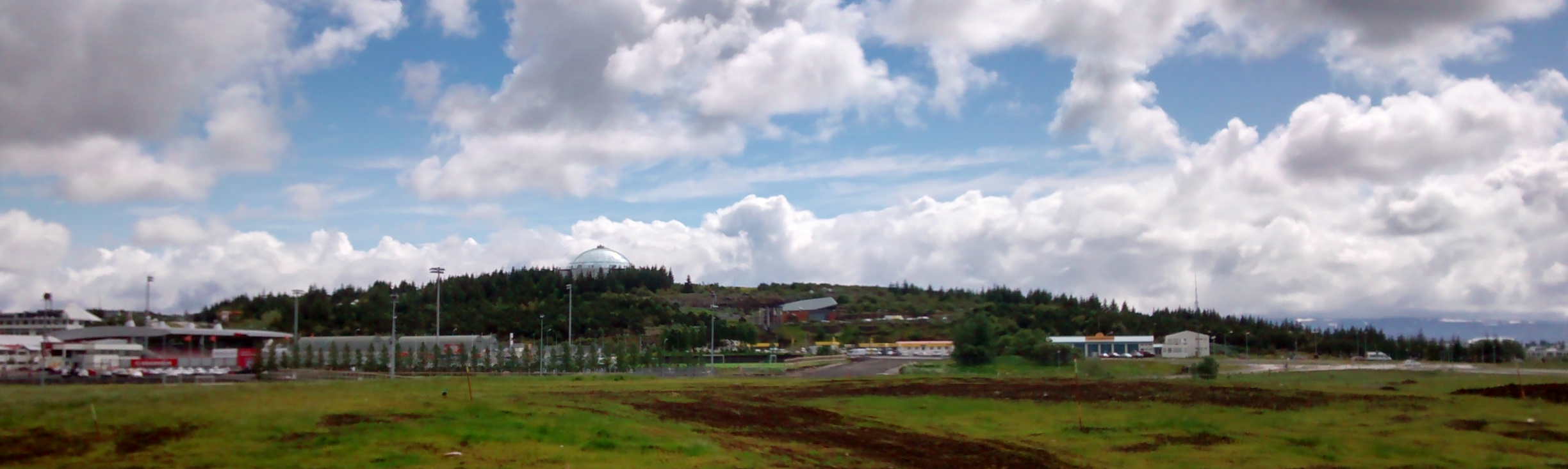 Öskjuhlíð